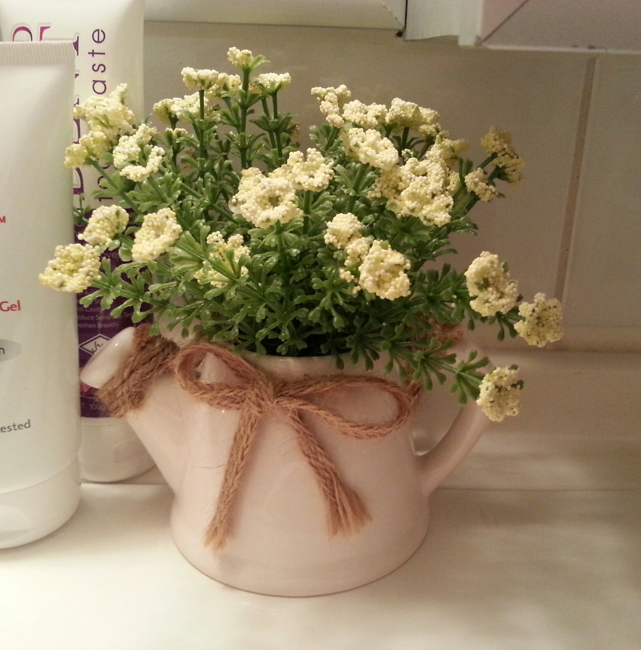 조화가 화분에 담겨 있다.